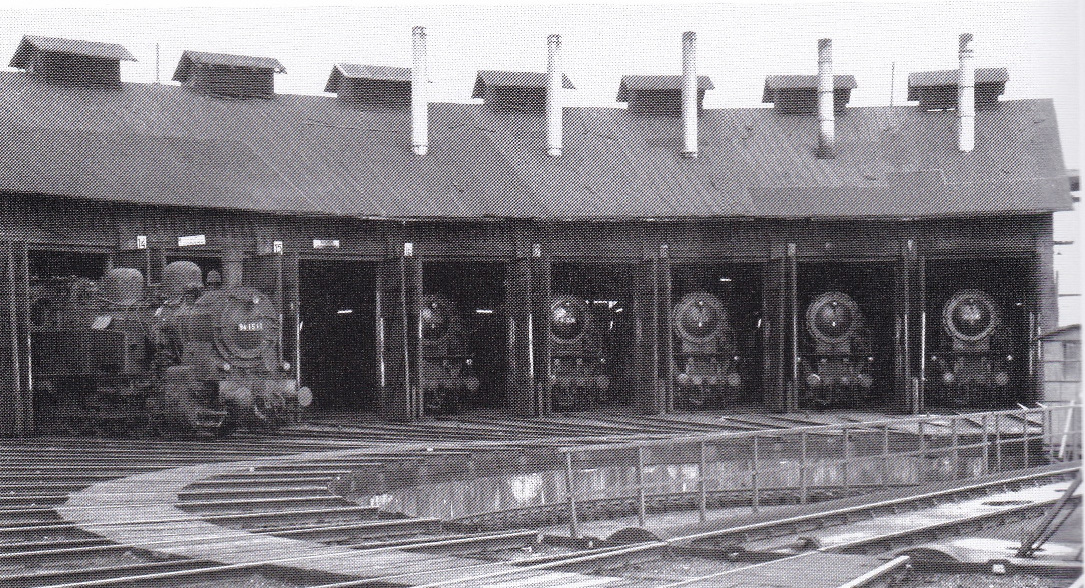 Rundlokschuppen auf der Westseite vom Güterbahnhof Geestemünde mit BR 94 1511 und fünf BR 41